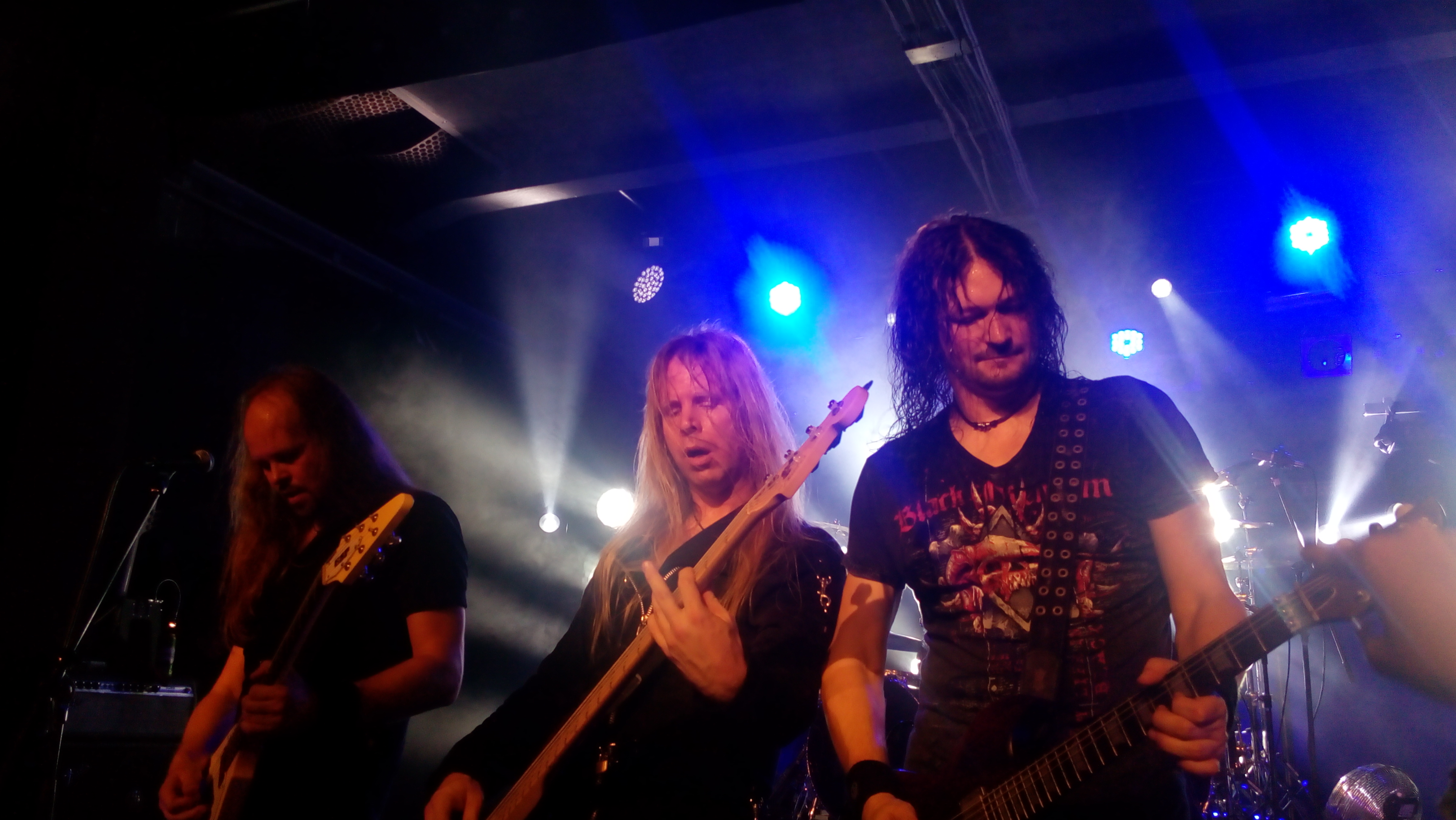 Edguy, Praha, 2. 10. 2017